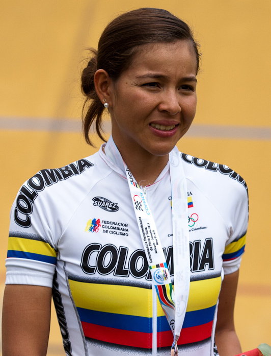 Lorena Vargas en el podio